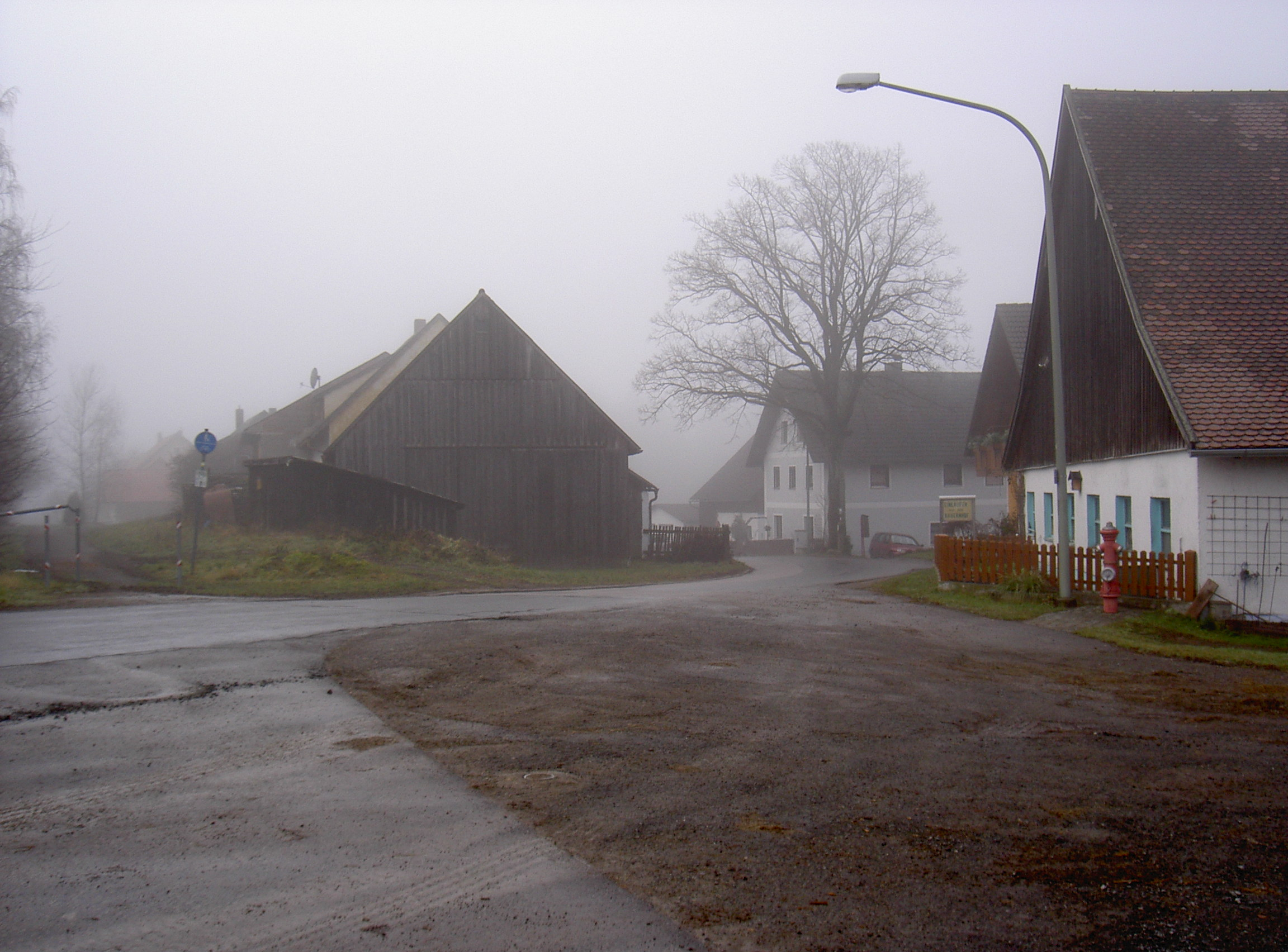 Aschahof